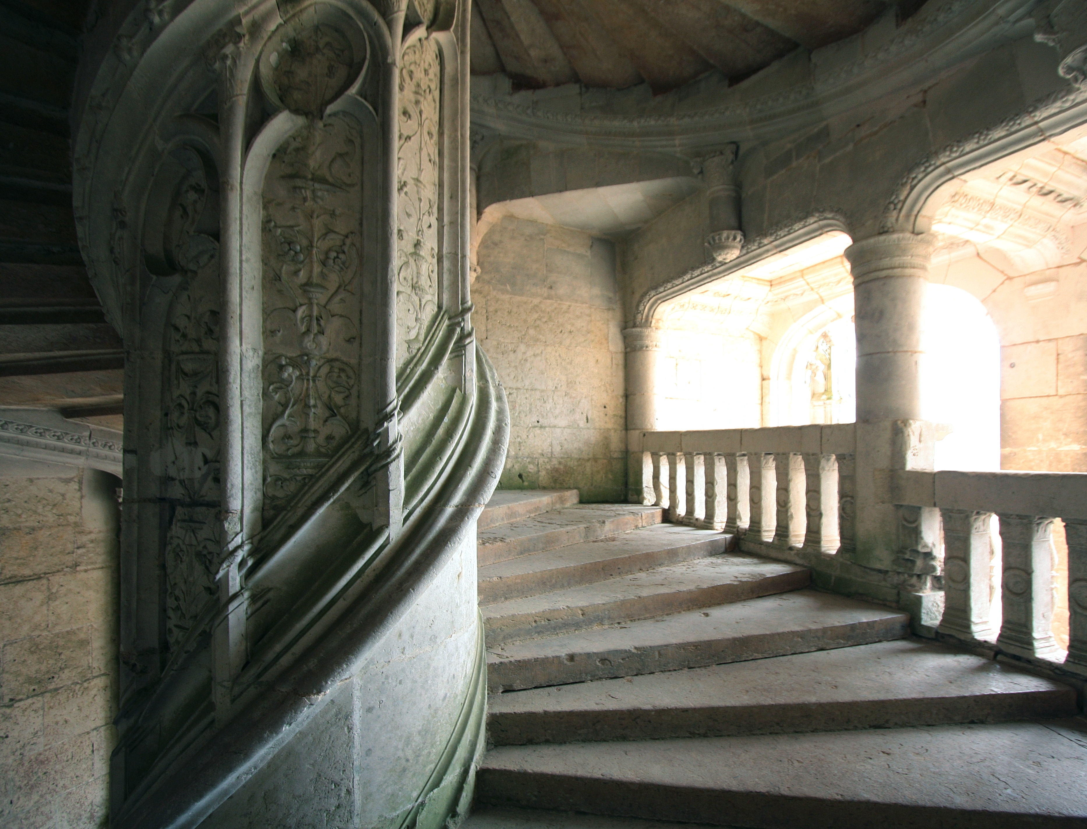 Château de Châteaudun, Département Eure-et-Loir/Frankreich - Große Renaissance-Treppe im Longueville-Flügel